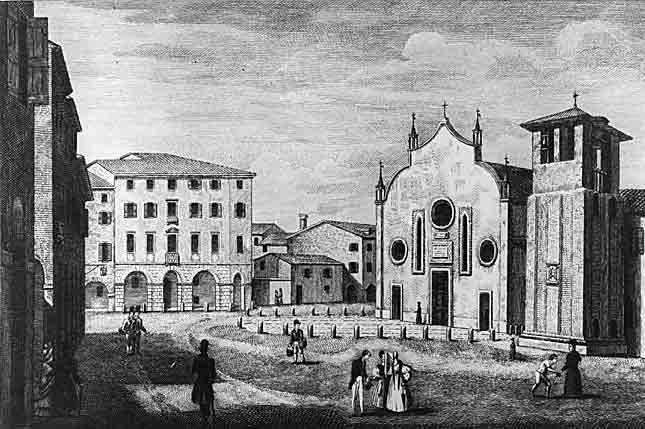 Chiesa di Santa Fosca in Santa Maria Maggiore, a Treviso. Incisione di Antonio Nani, XIX secolo. Foto dell'Archivio Storico Trevigiano, Fondo Fini, n° immagine: F 8047